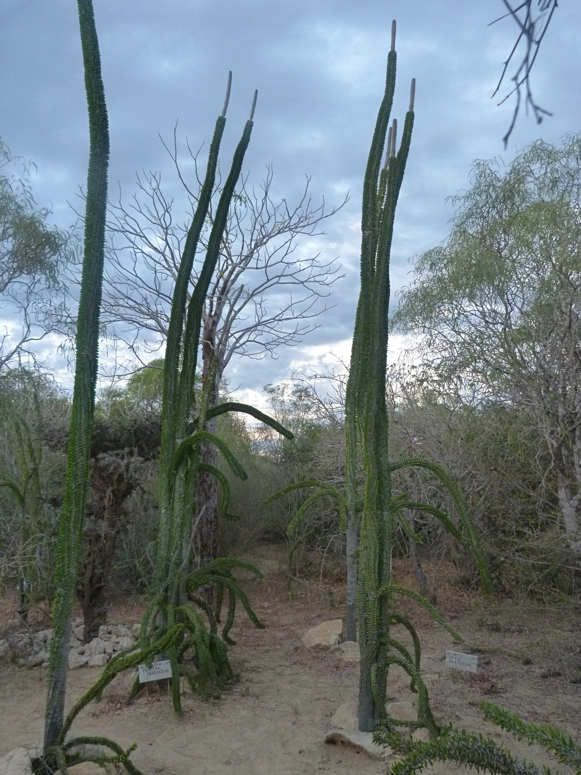 Arboretum d'Antsokay, Tuléar, Madagascar.